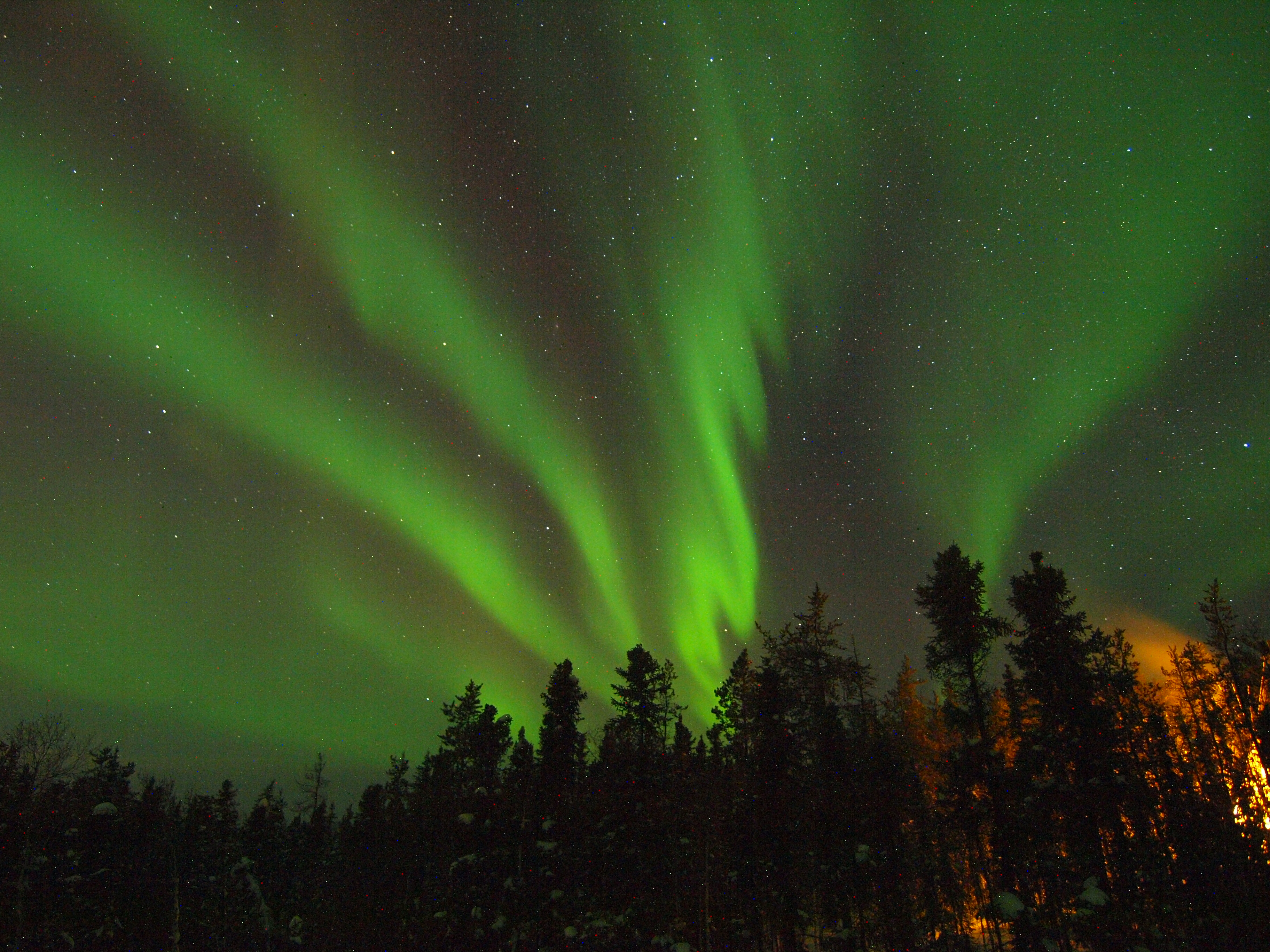 Yellow Knife , NWT , Canada